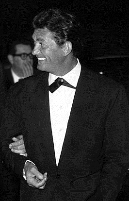 L'acteur français Jean Marais en 1961, durant le Festival dei due mondi. Spoleto, Ombrie, Italie.